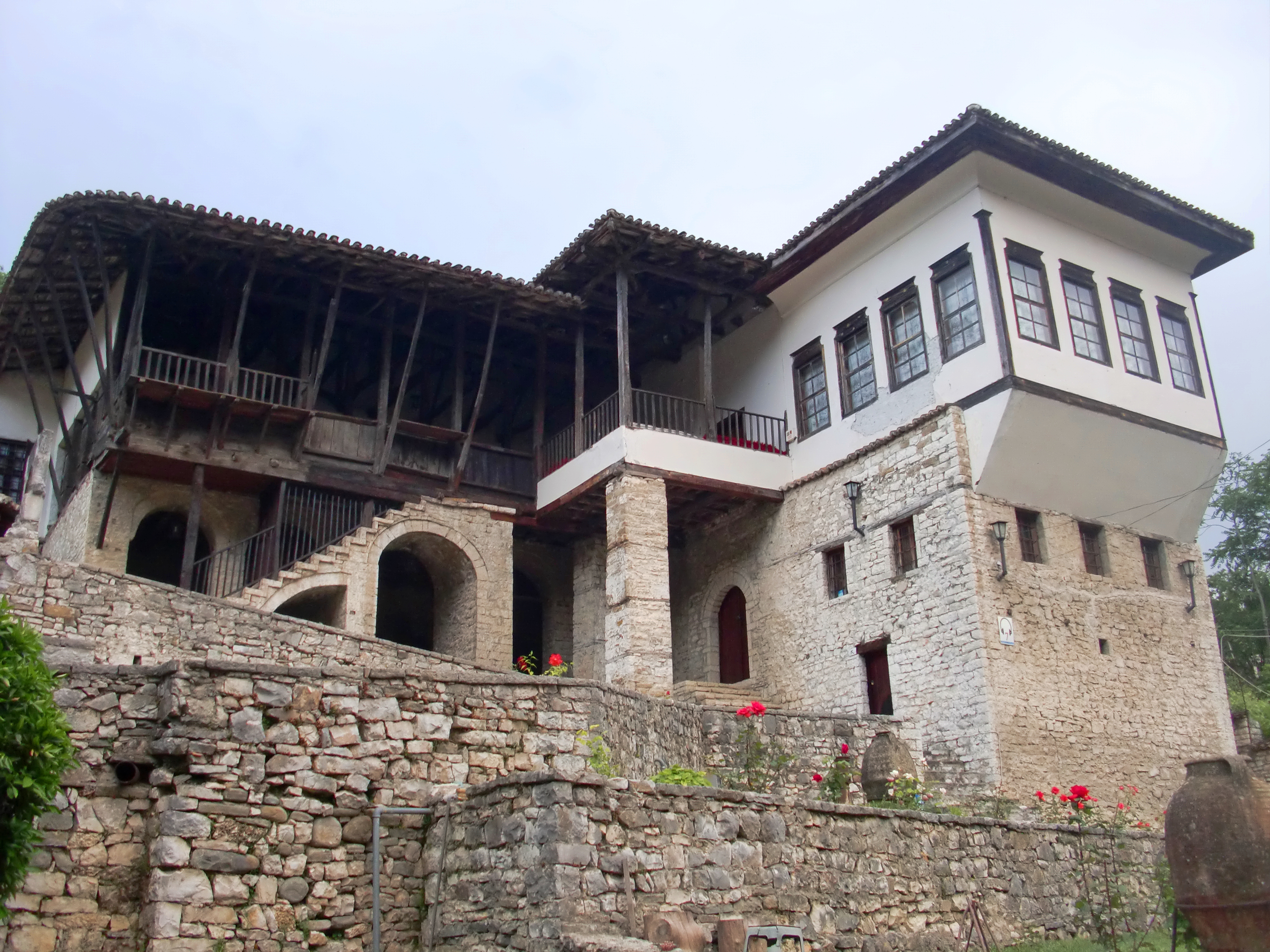 Kalaja e Beratit